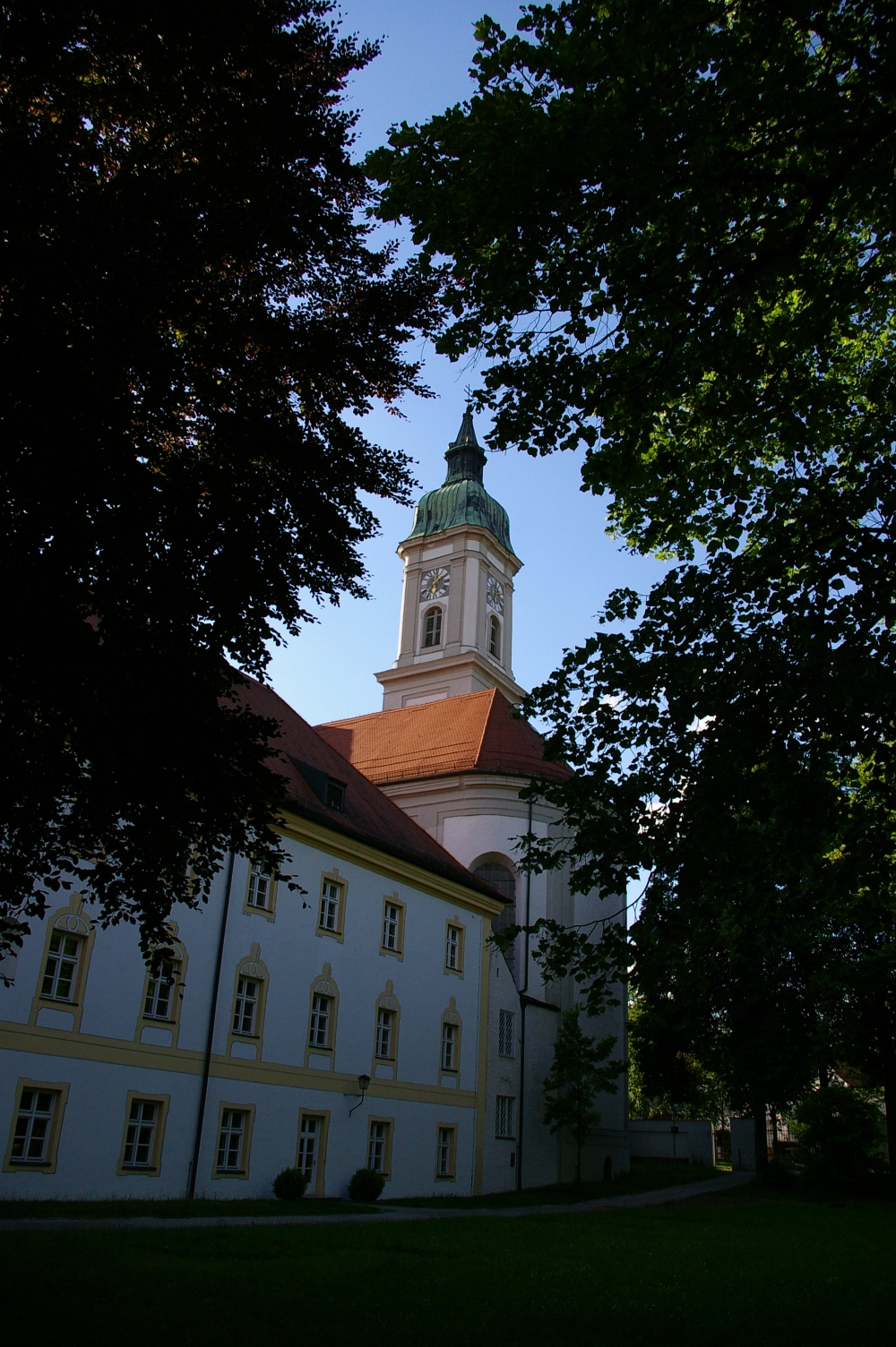 Das Kloster Neustift (heute Landratsamt) in Freising mit Sankt Peter und Paul vom Klostergarten aus.